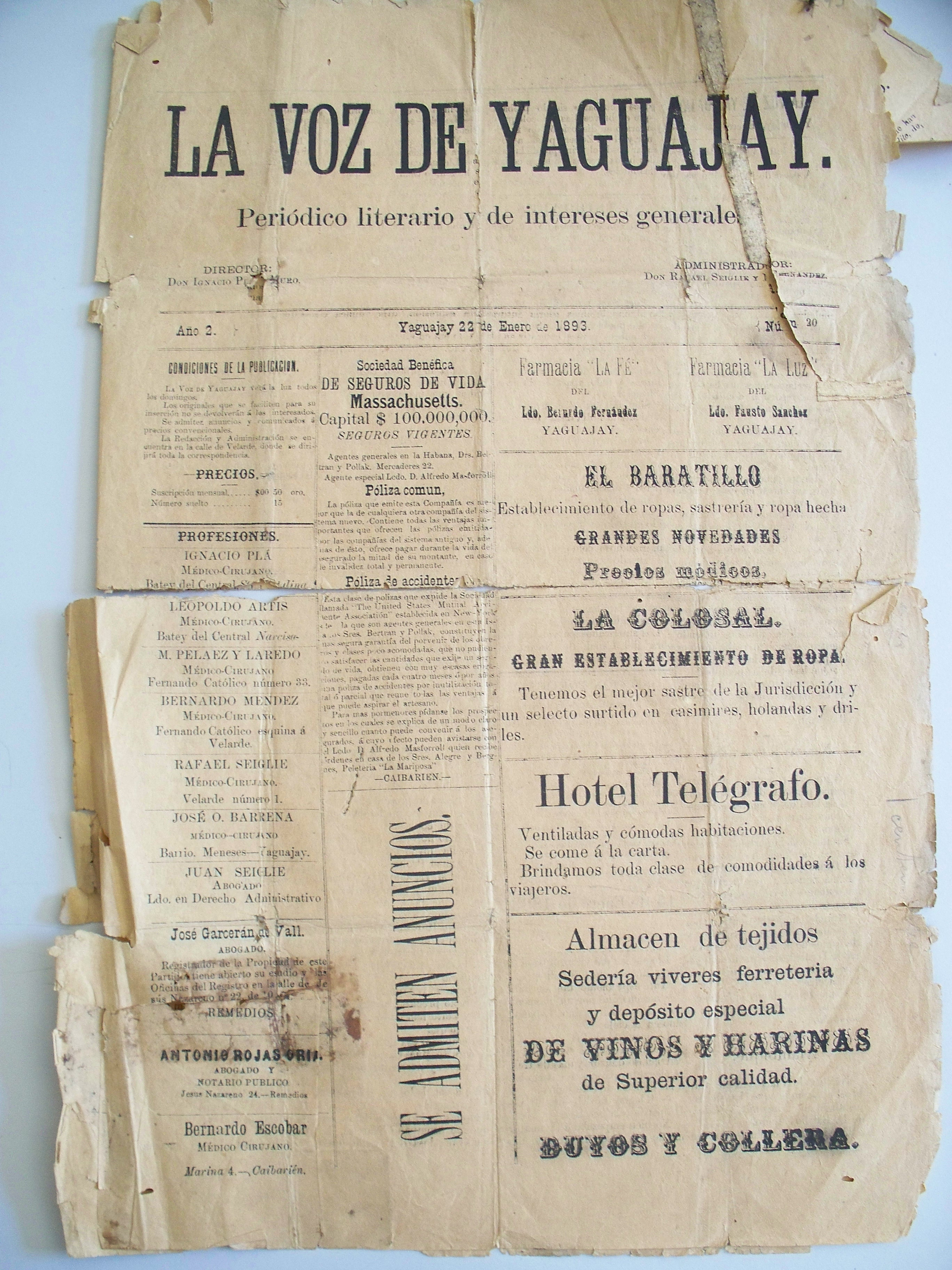 Portada de ejemplar del periódico La Voz de Yaguajay, 1893